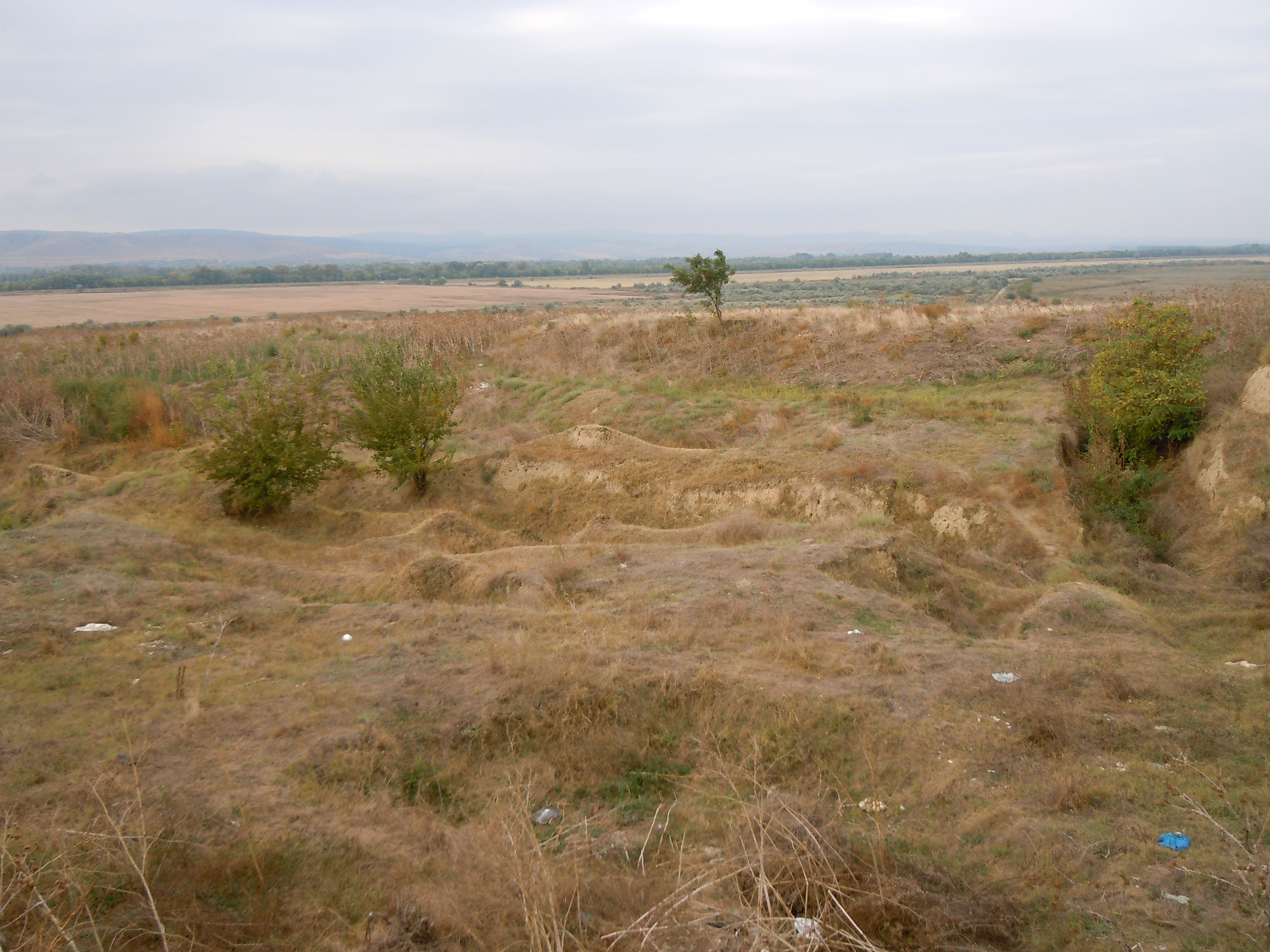 Городище «Орлівка» («Кам'яна Гора»), село Орлівка